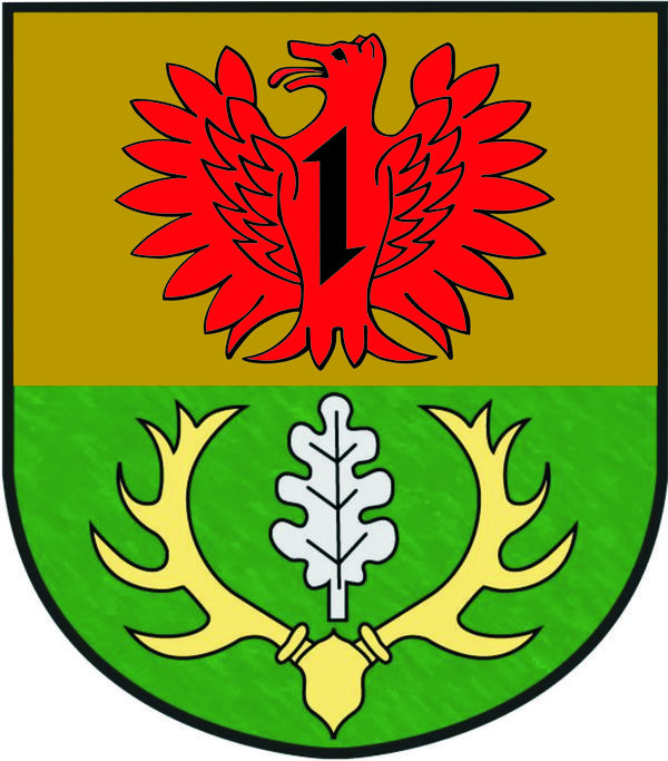 Wappen von Stipshausen